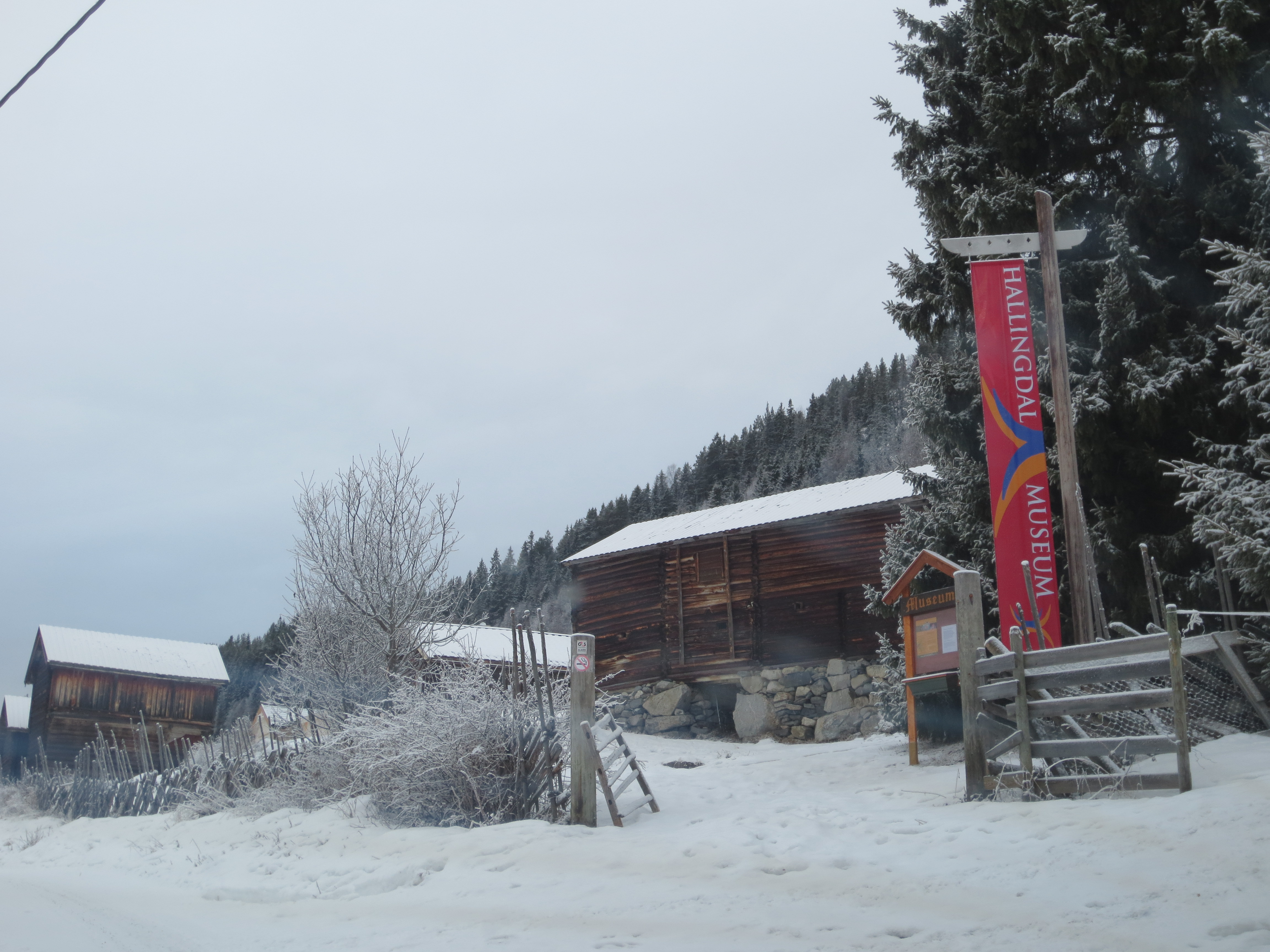 Motiv av gårdstun på det rikholdige Gol Bygdemuseum, Hallingdal i Buskerud